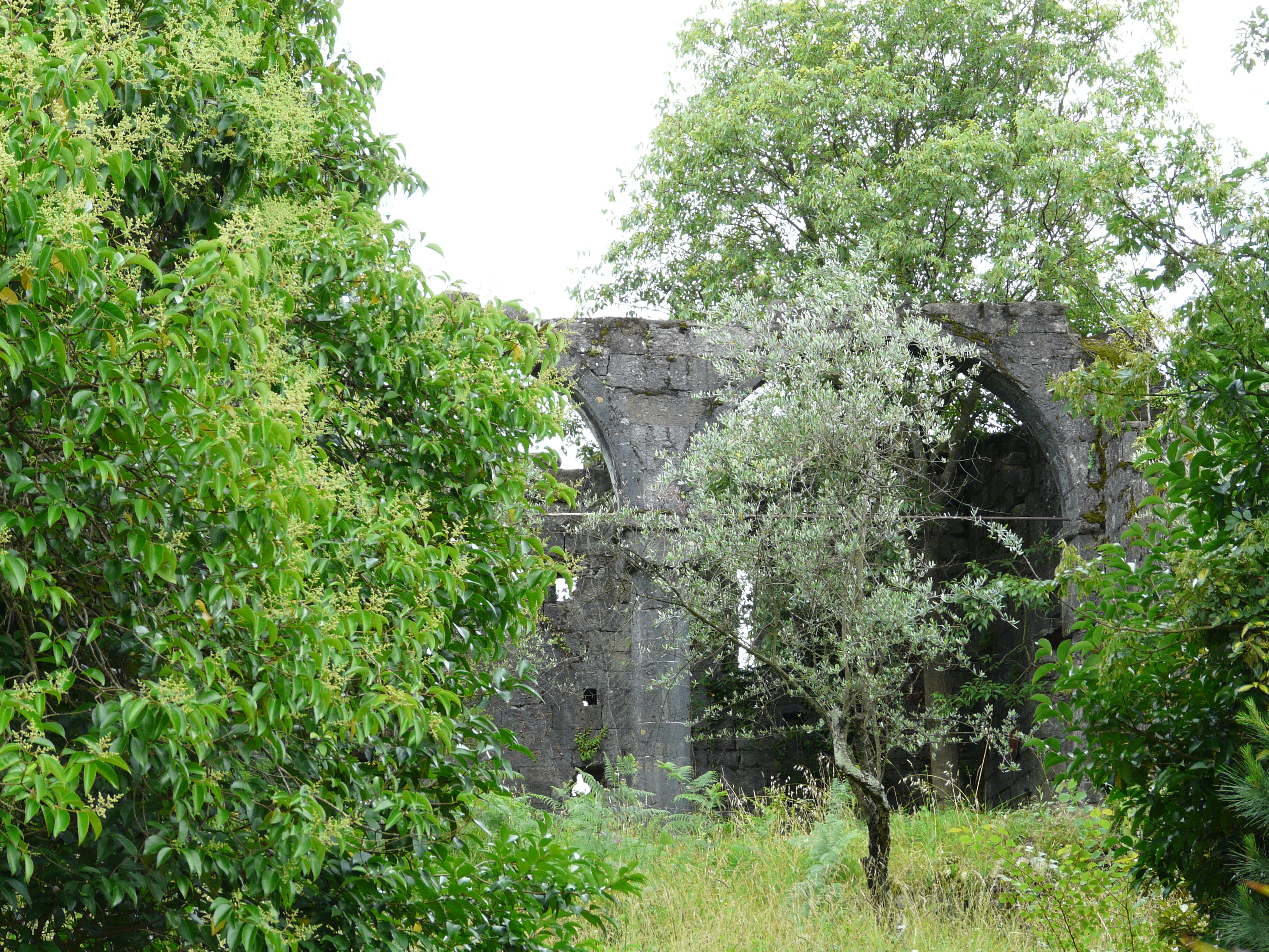 Ruderi del cenobio di San Tommaso, Rapallo, Liguria, Italia